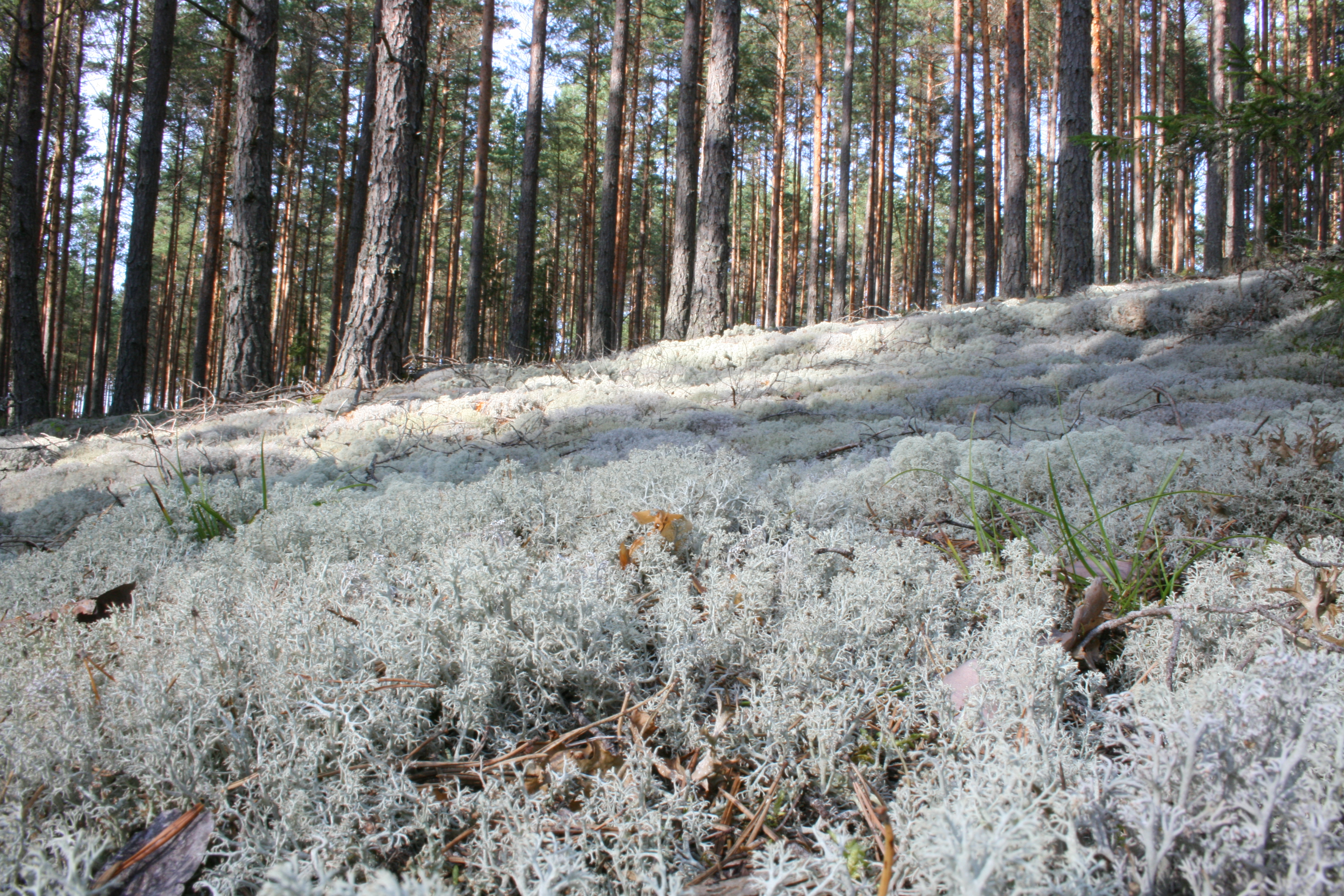 Baltie ķērpji.White lichens